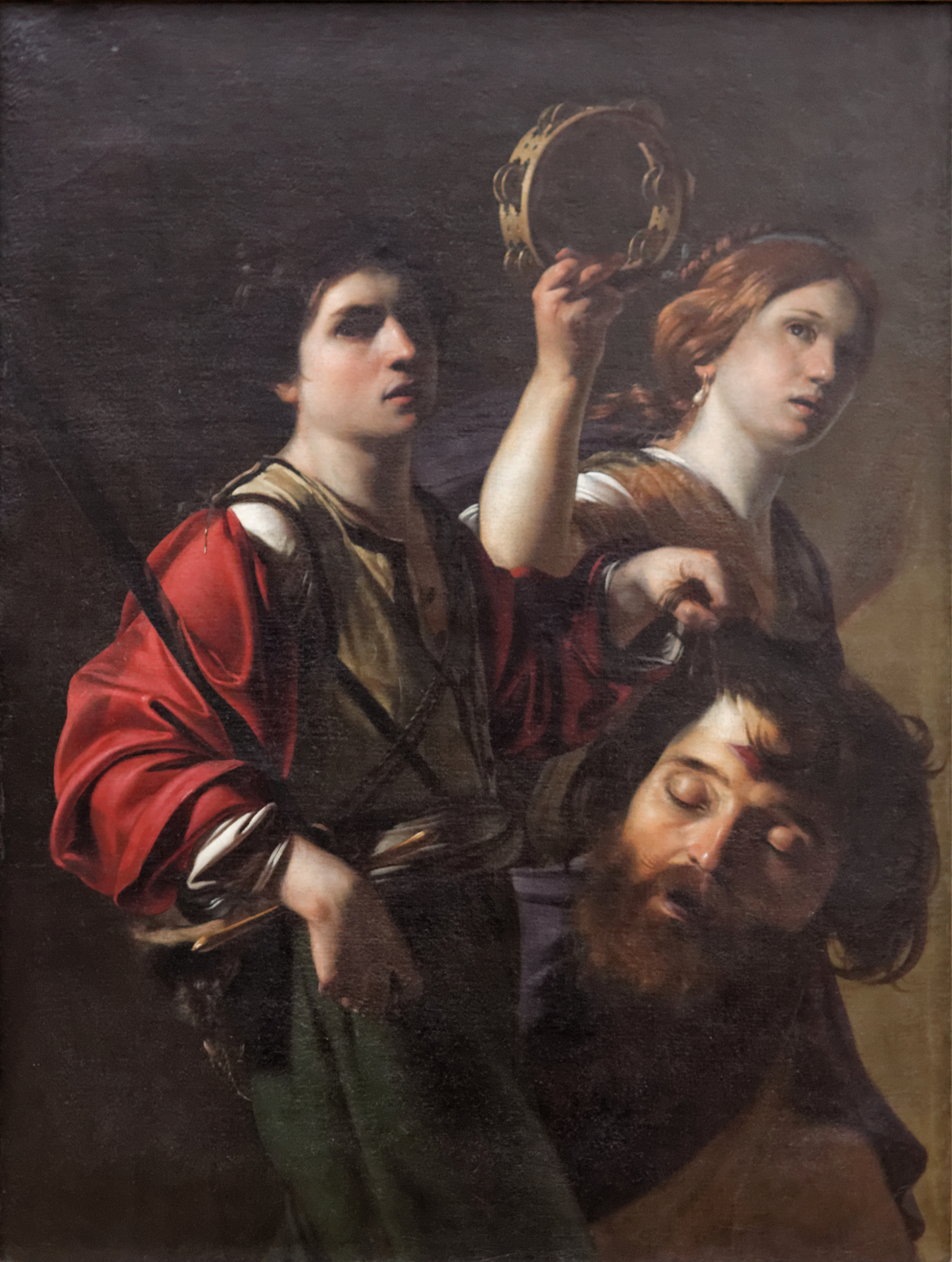 Siegreich zeigt sich der junge David, der den Kampf mit dem Riesen Goliath aufnahm, und ihn durch einen gezielten Schuss an der Stirn tödlich verletzte. Danach schlug er sein Haupt ab mit dem Schwert, und präsentierte ihn als Trophäe, was die Philister sahen und daraufhin die Flucht ergriffen. Dies ist die Geschichte aus dem Alten Testament (1.Samuel 17,48-51), bildlich umgesetzt von dem Barockmaler B.Manfredi. Als dritte Person eine Musikerin, die zum Sieg ihre Schellen erklingen lässt.